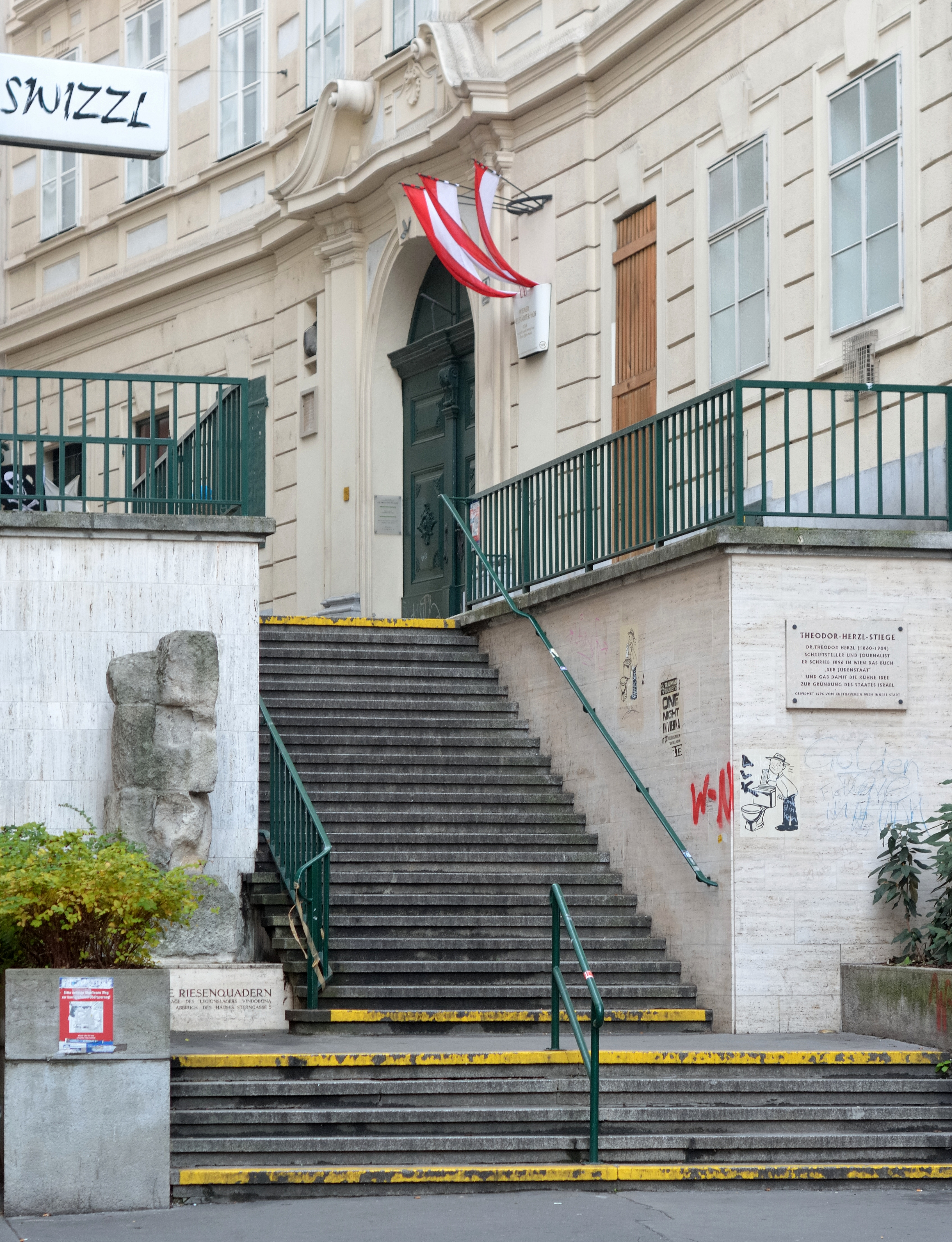 Theodor-Herzl-Stiege, 1010 Wien